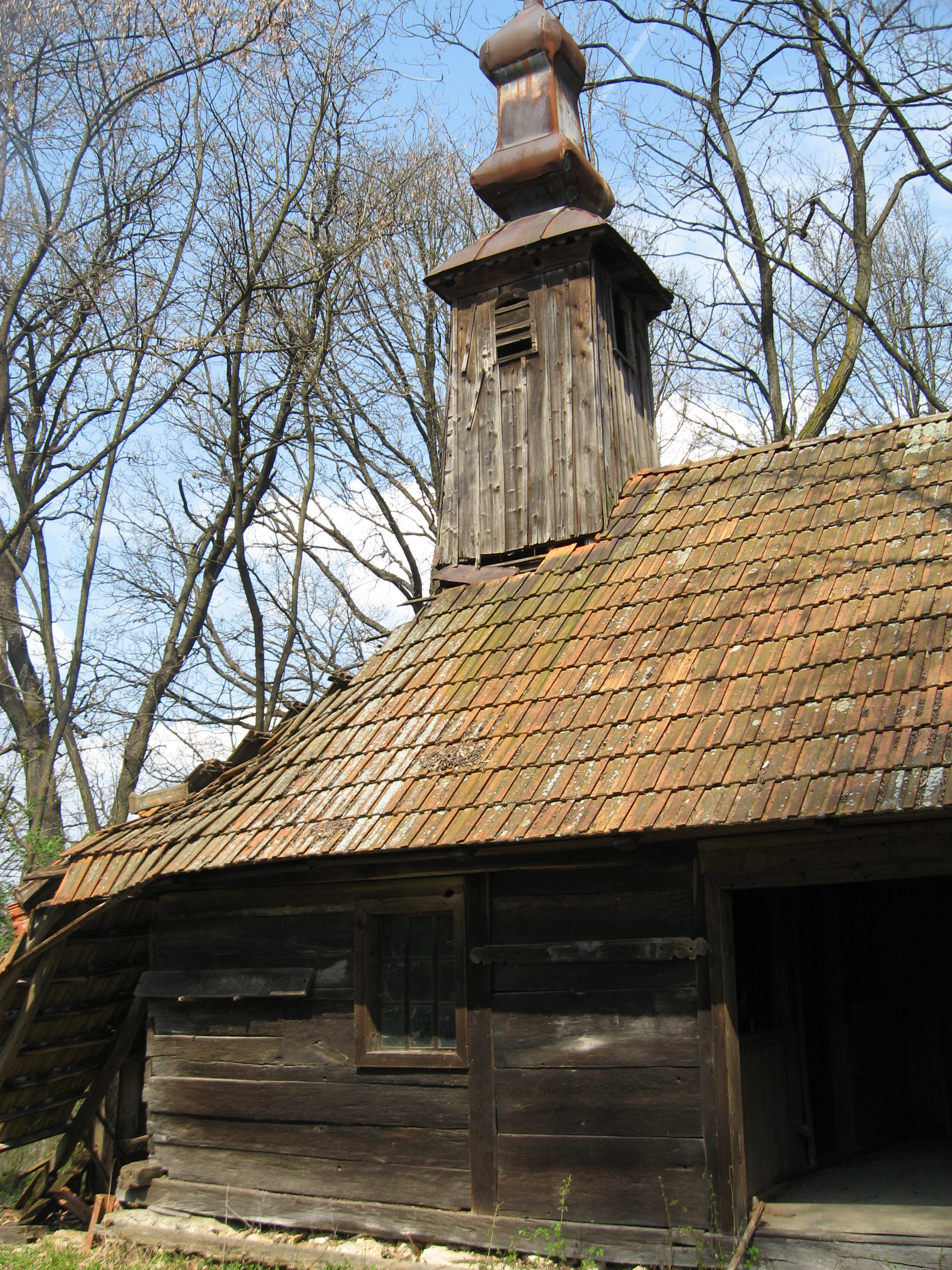 Biserica de lemn din fostul sat Baștea, județul Hunedoara